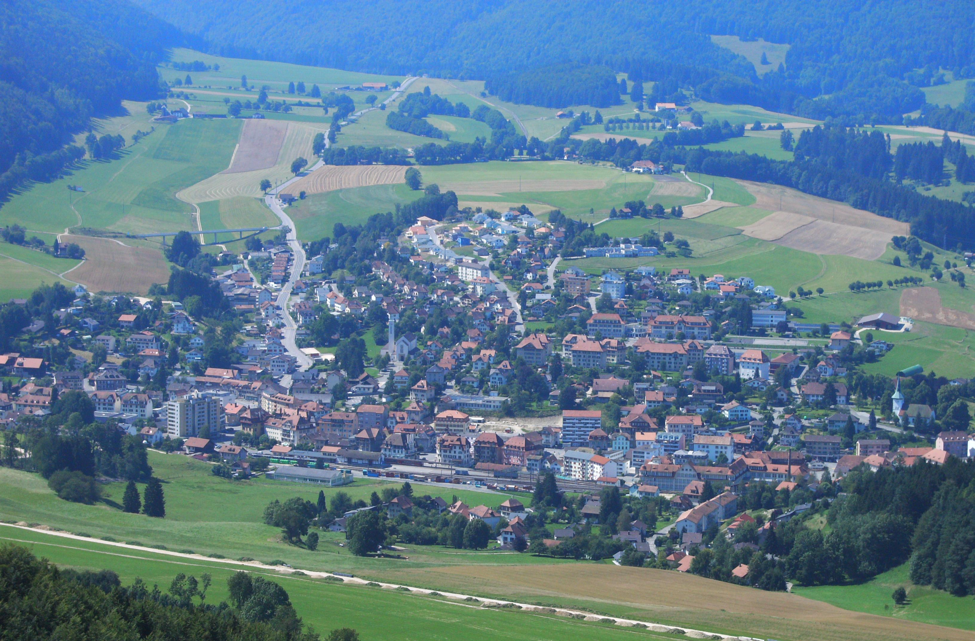 Vue d'ensemble de la commune de Tavannes (BE, Suisse). Prise de la photo depuis la montagne de Montoz.